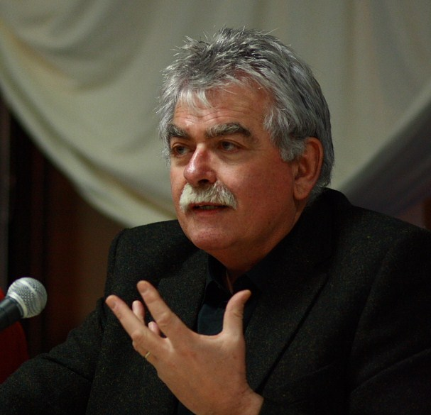 André Chassaigne, Député du Puy-de-Dôme